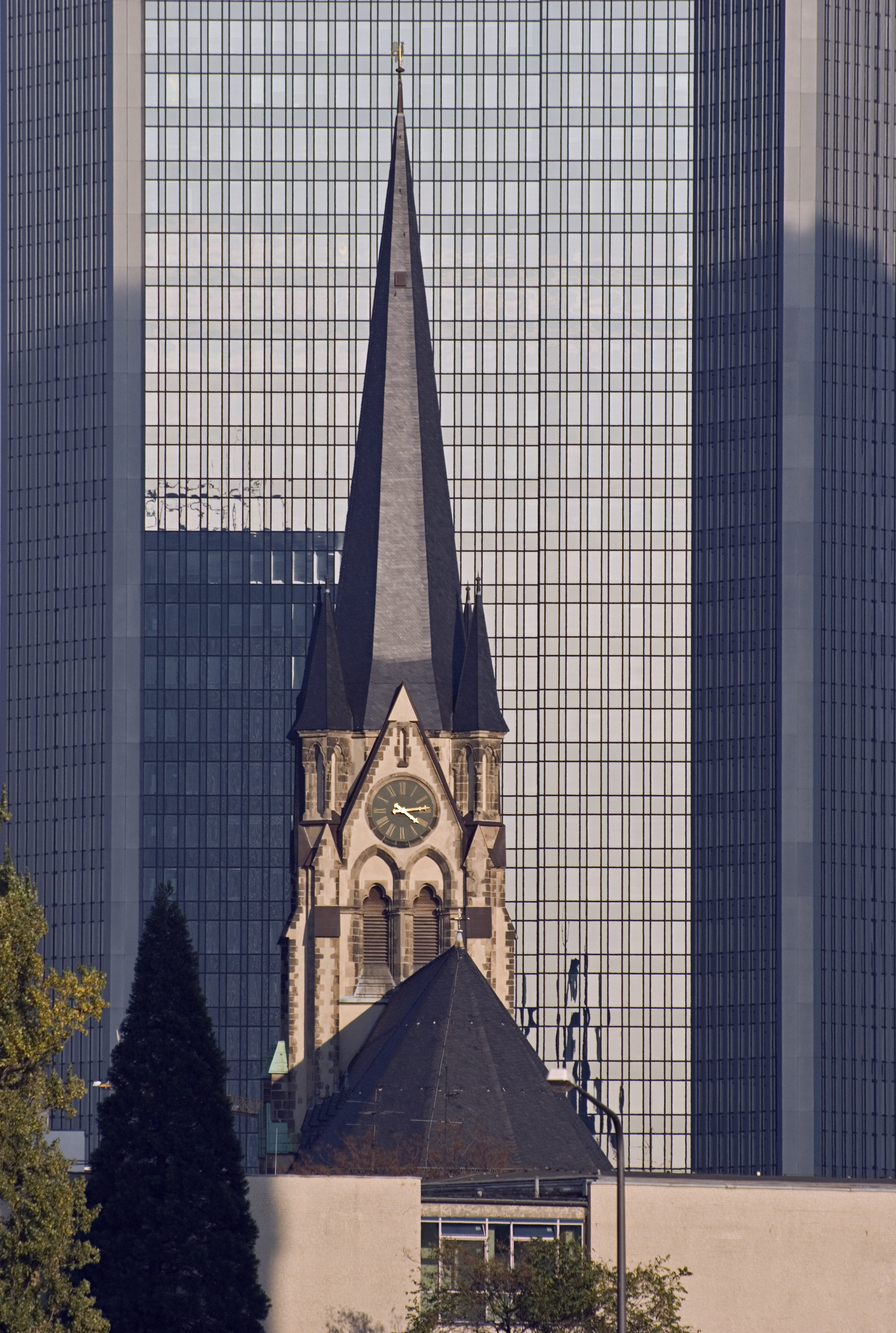 Antoniuskirche in Frankfurt am Main, Blick aus Richtung Osten von der Den Haager Straße, im Hintergrund das Trianon